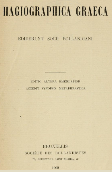 Титульный лист Bibliotheca Hagiographica Graeca издания 1909 года